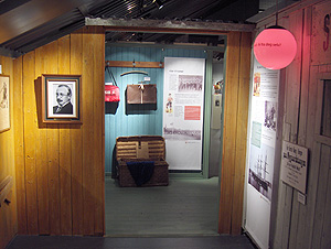 Fra inngangspartiet til Fotballmuseet i Fredrikstad.